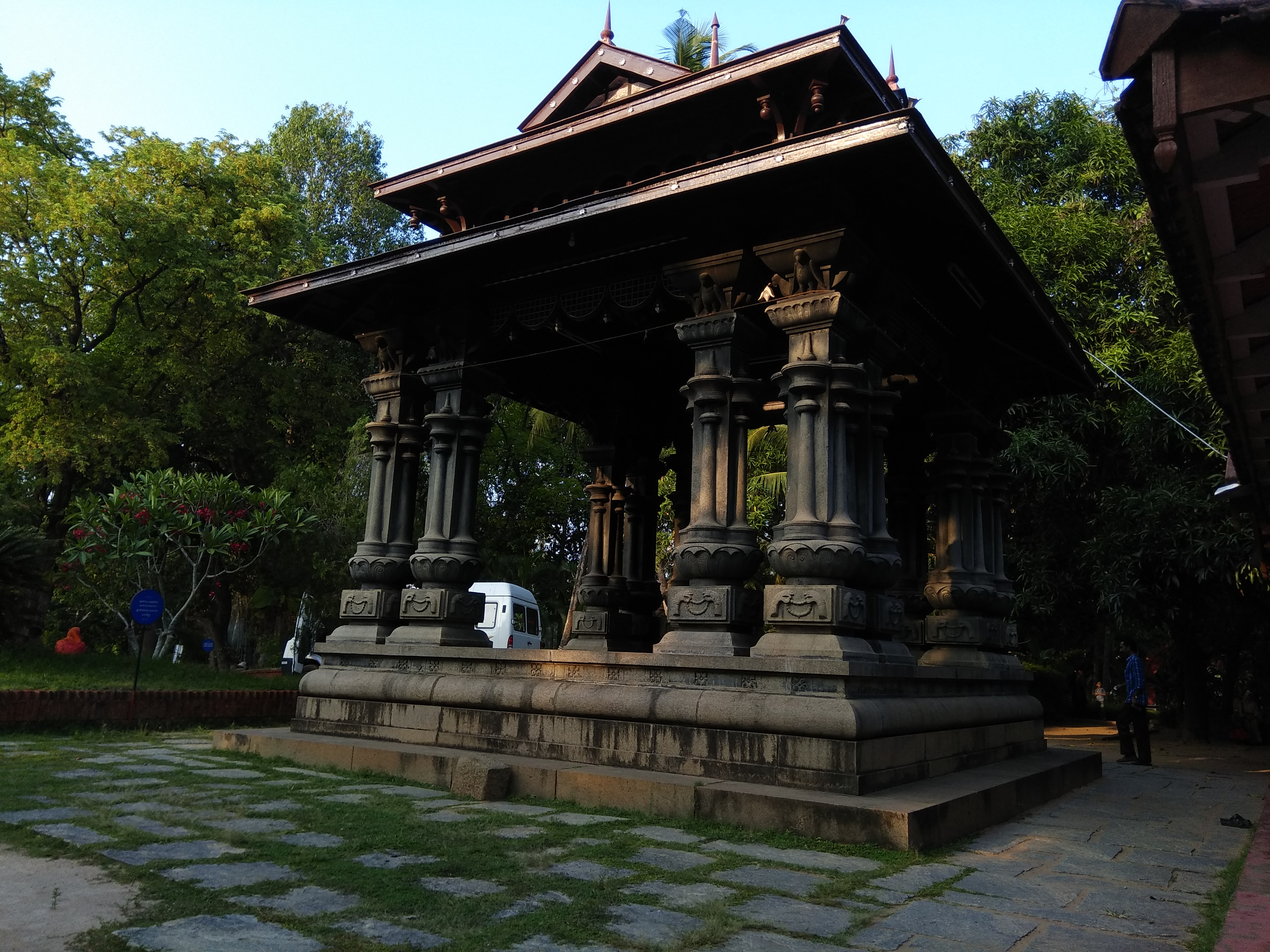 Tunchan mandapam tirur